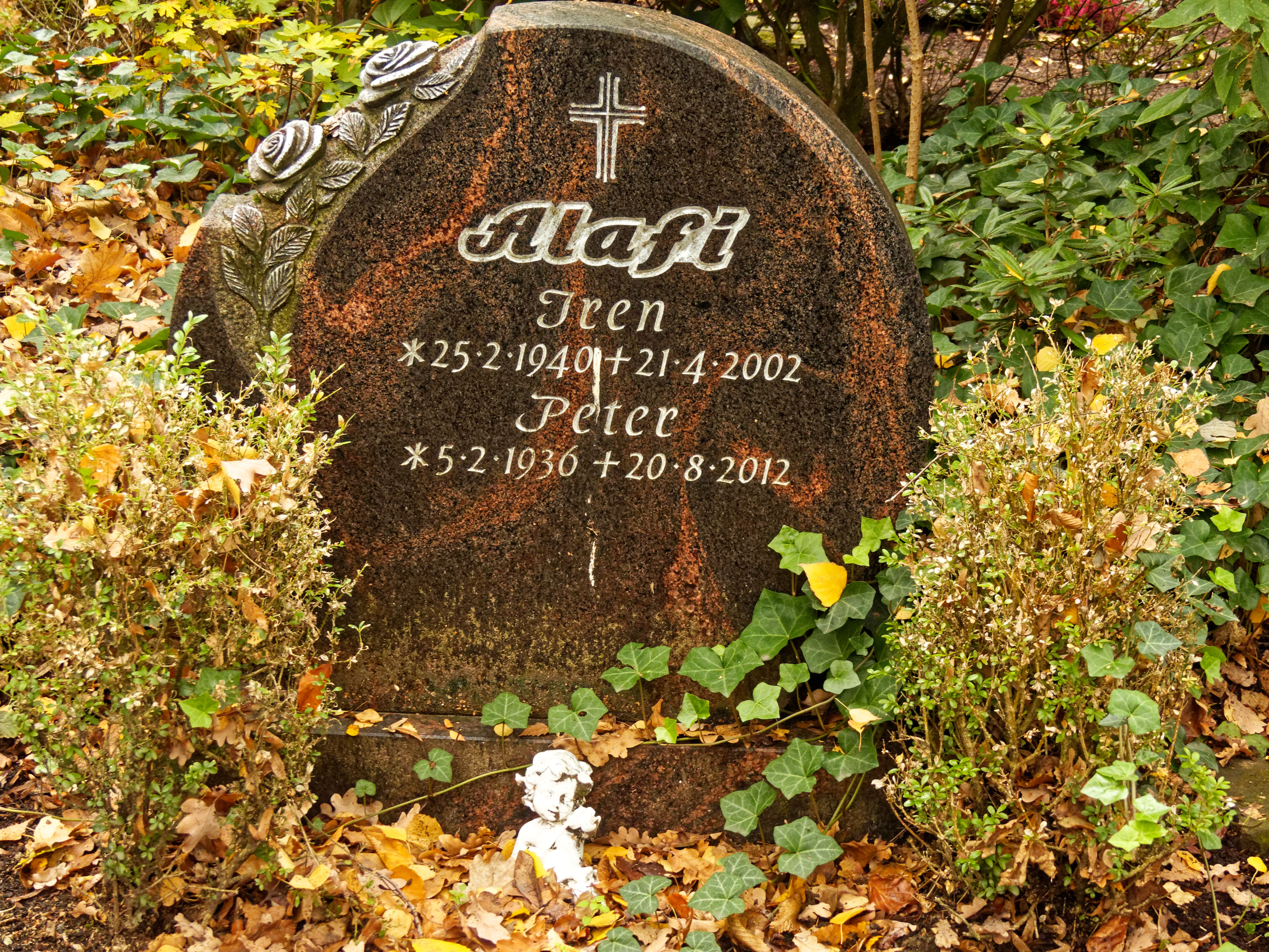 Grab von Peter Alafi auf dem Waldfriedhof Krefeld-Verberg nahe der Rennbahn